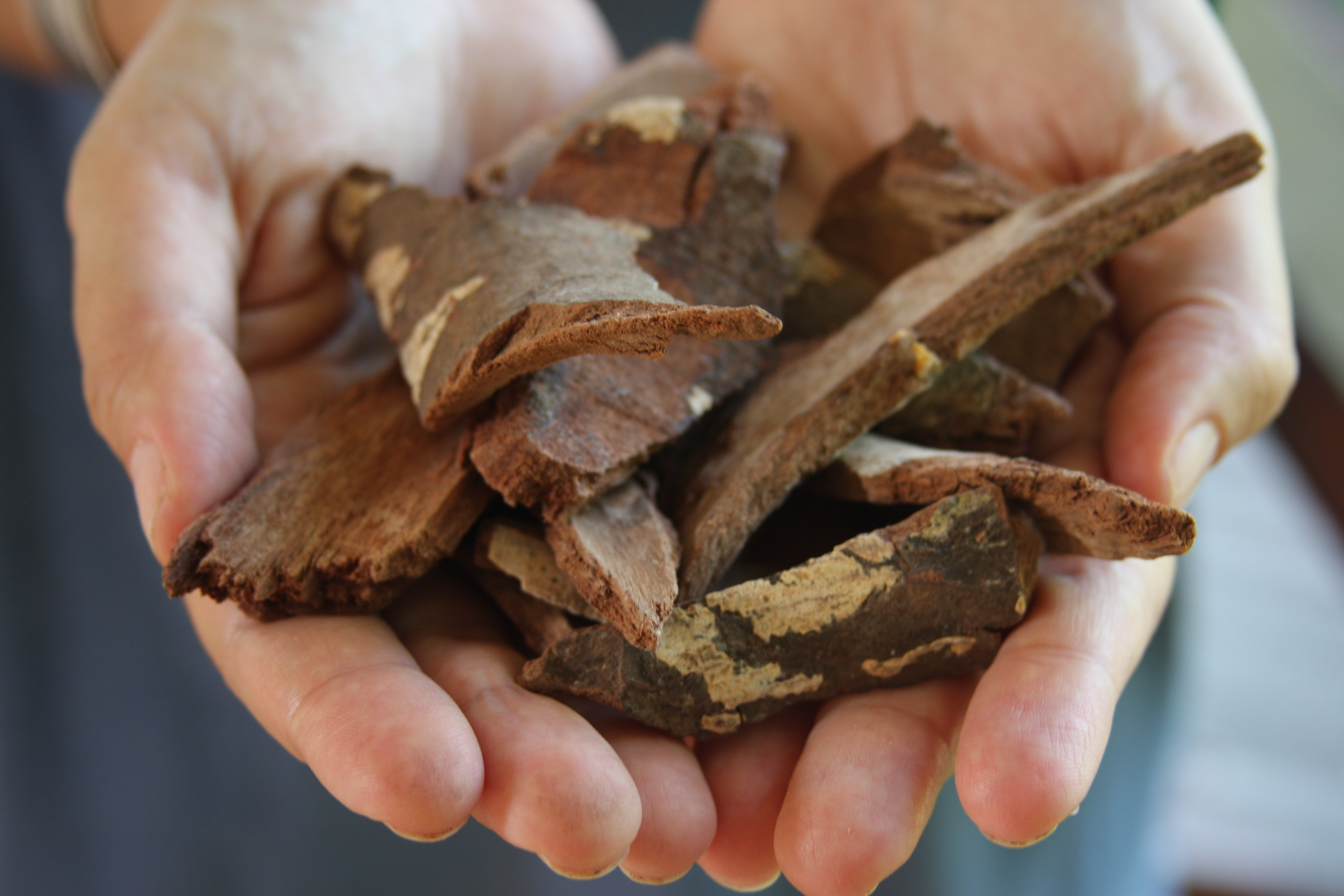 Corteza de chuchuwasi (Monteverdia macrocarpa) del Jardín Botánico del Centro Takiwasi, Tarapoto, Perú. El chuchuwasi es utilizado dentro de la medicina tradicional amazónica como una planta de aprendizaje en las llamadas dietas amazónicas o retiros.